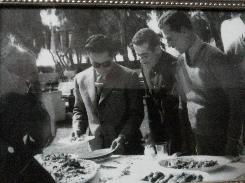 صور للعميد احمد يعقوب الخياط مع جلالة تالملك فيصل الثاني ملك العراق رحمه الله